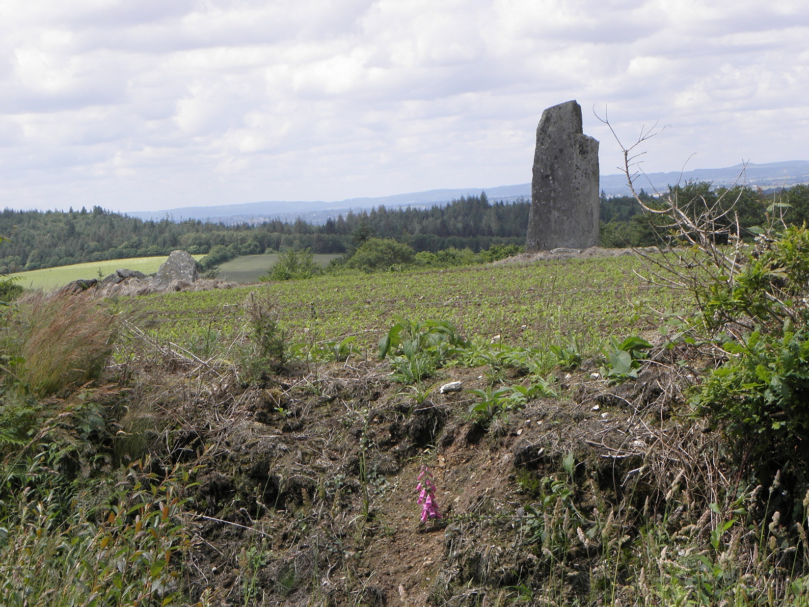 Allignement de menhirs de Trimen en Saint-Goazec (29).